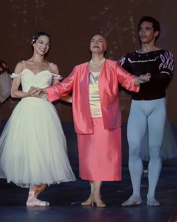 Alicia Alonso, directrice du ballet national de Cuba, entourée des deux étoiles, saluant lors de la dernière représentations de Giselle au Grand Palais à Paris. A gauche : Viengsay Valdès dans le rôle de Giselle ; à droite : Romel Frometa dans le rôle d'Albrecht, le prince. Dans le cadre de la 3e edition du festival ?Les étés de la danse de Paris?, le Ballet National de Cuba a présenté deux ballets du répertoire classique, Giselle et Don Quichotte. Cette compagnie a proposé aussi des portes ouvertes permettant d?assister aux cours et à des démonstrations des jeunes danseurs. Le Ballet National de Cuba a été créé en 1948 par Madame Alicia Alonso, danseuse devenue chorégraphe et actuellement directrice artistique de la compagnie, malgré son âge et sa cécité.